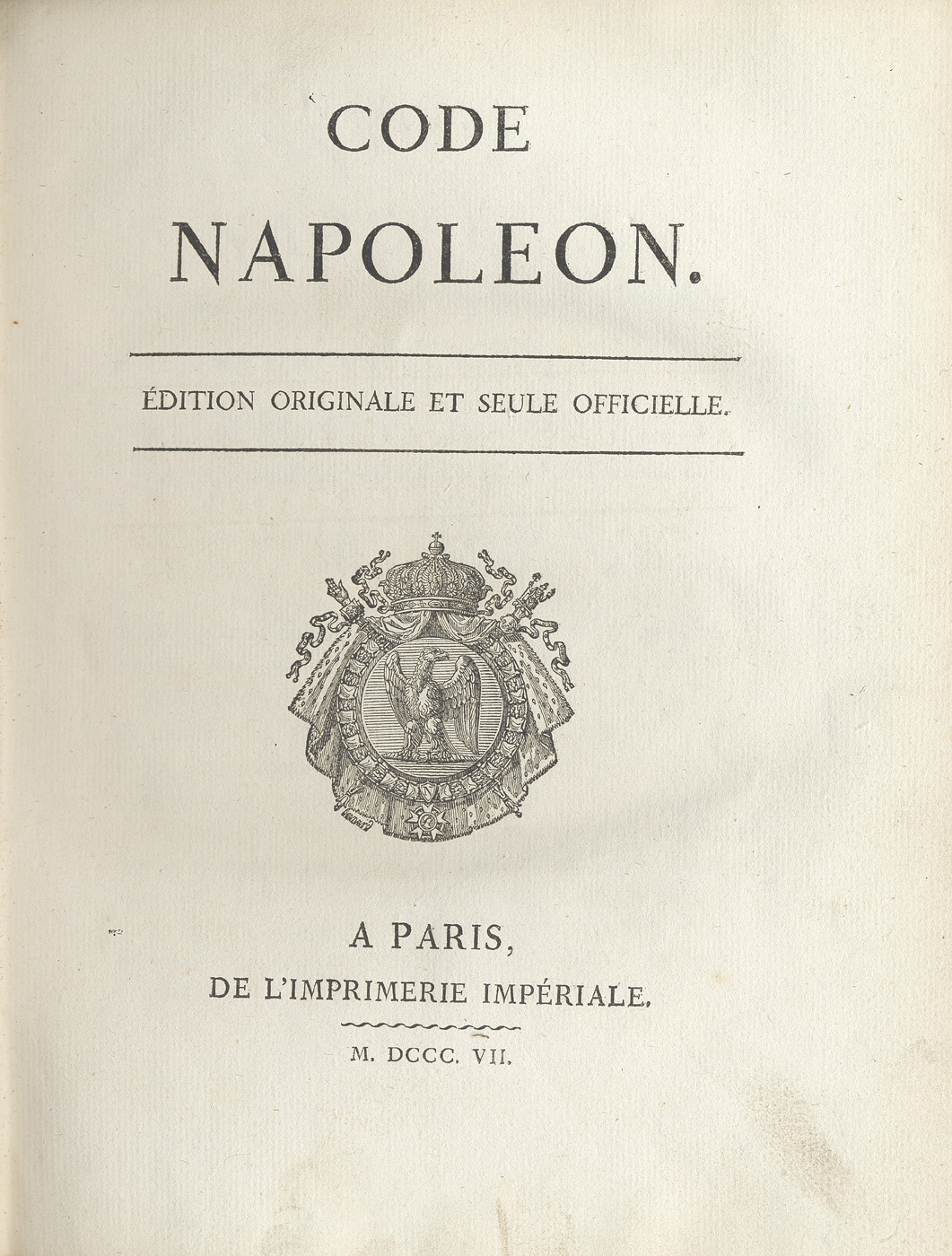 Code Napoléon. Édition originale et seule officielle